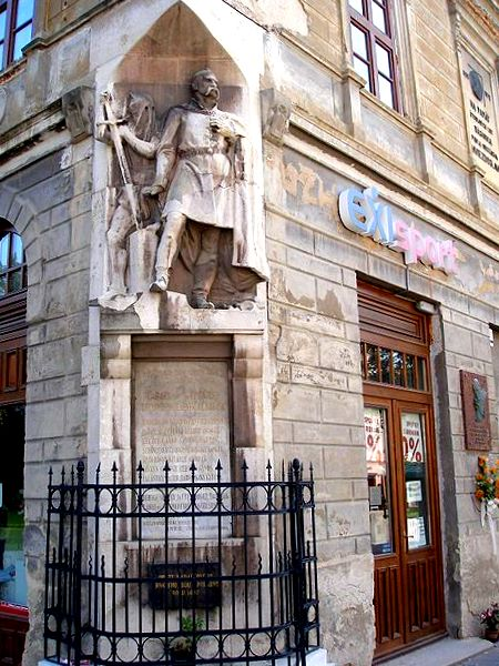 Pomník obetiam Caraffovho krvavého súdu z roku 1687 spolu s pamätnou tabuľou a menami popravených. Pomník odhalili v roku 1908. Vytvoril ho sochár Béla Markupp a financoval profesorský zbor prešovského kolégia z výnosu celokrajinskej verejnej zbierky. Umiestnený je na severozápadnom nároží budovy Kolégia. V roku 1995 sa tu poklonil pamiatke prešovských mučeníkov pápež Ján Pavol II.